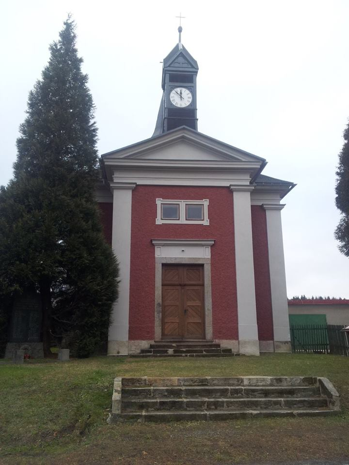 Kostel směrem od silnice